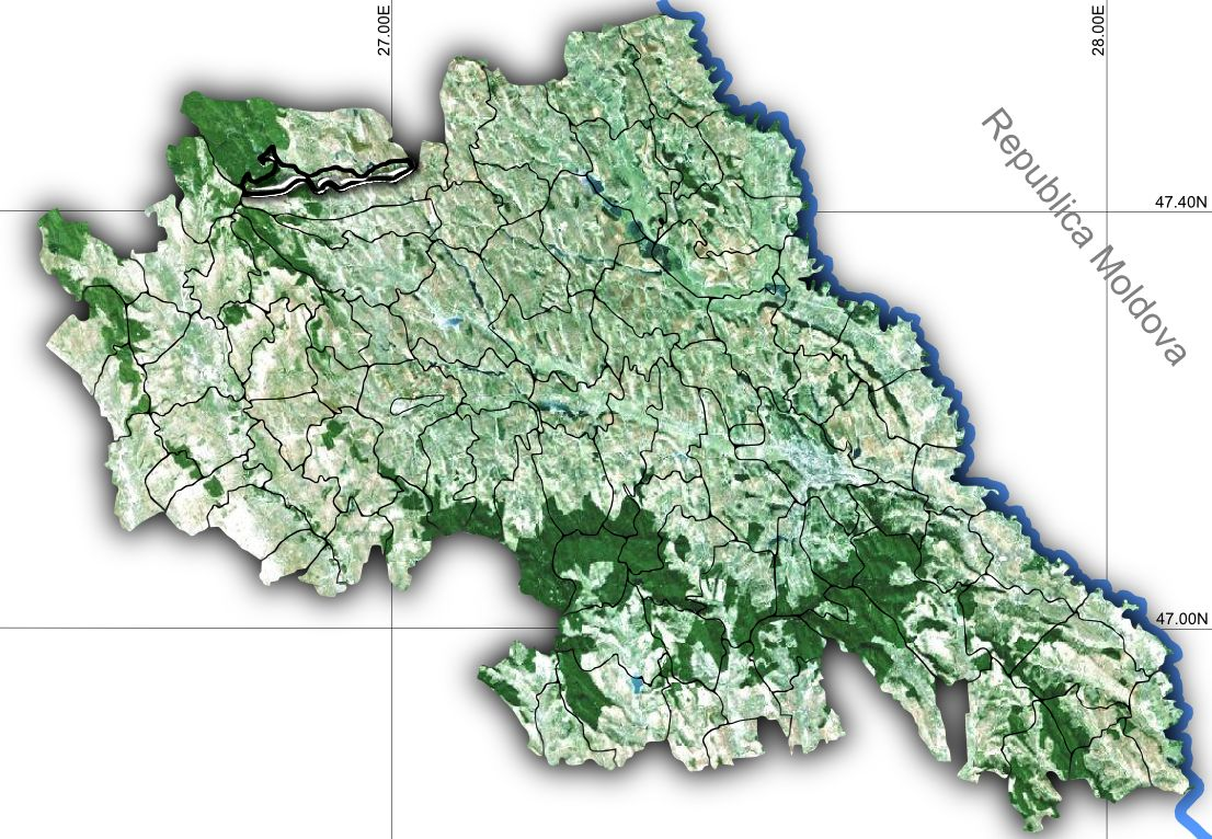 Harlau jud Iasi.